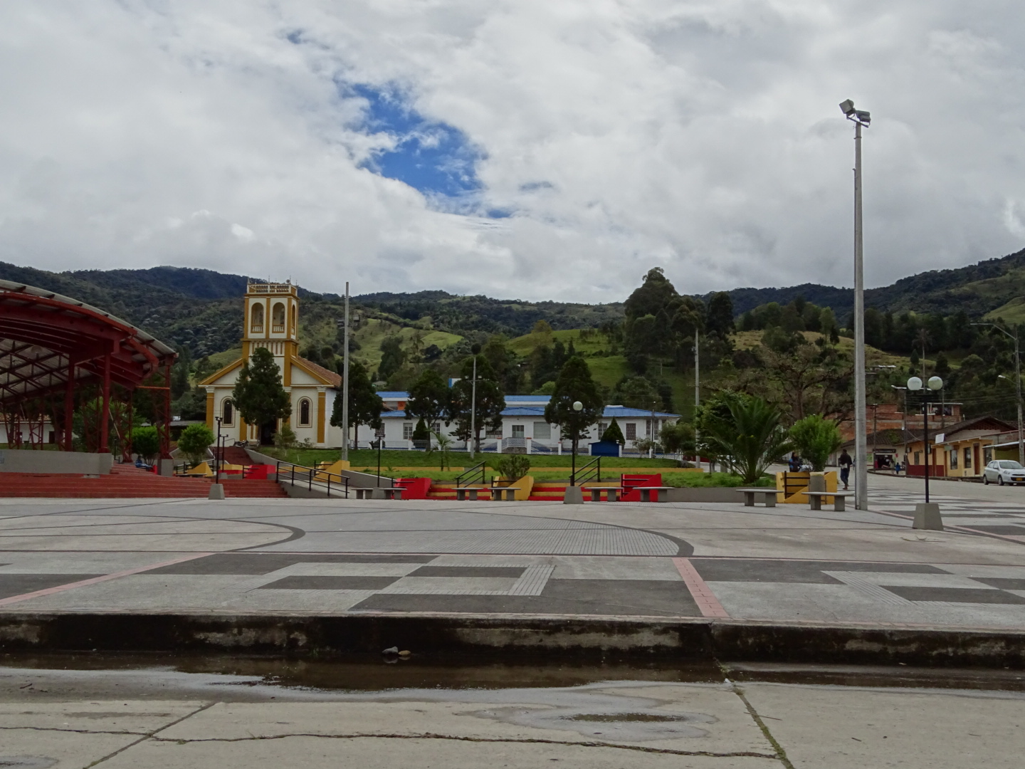 Parque Principal del área urbana del Municipio de Colon, departamento del Putumayo, Colombia.